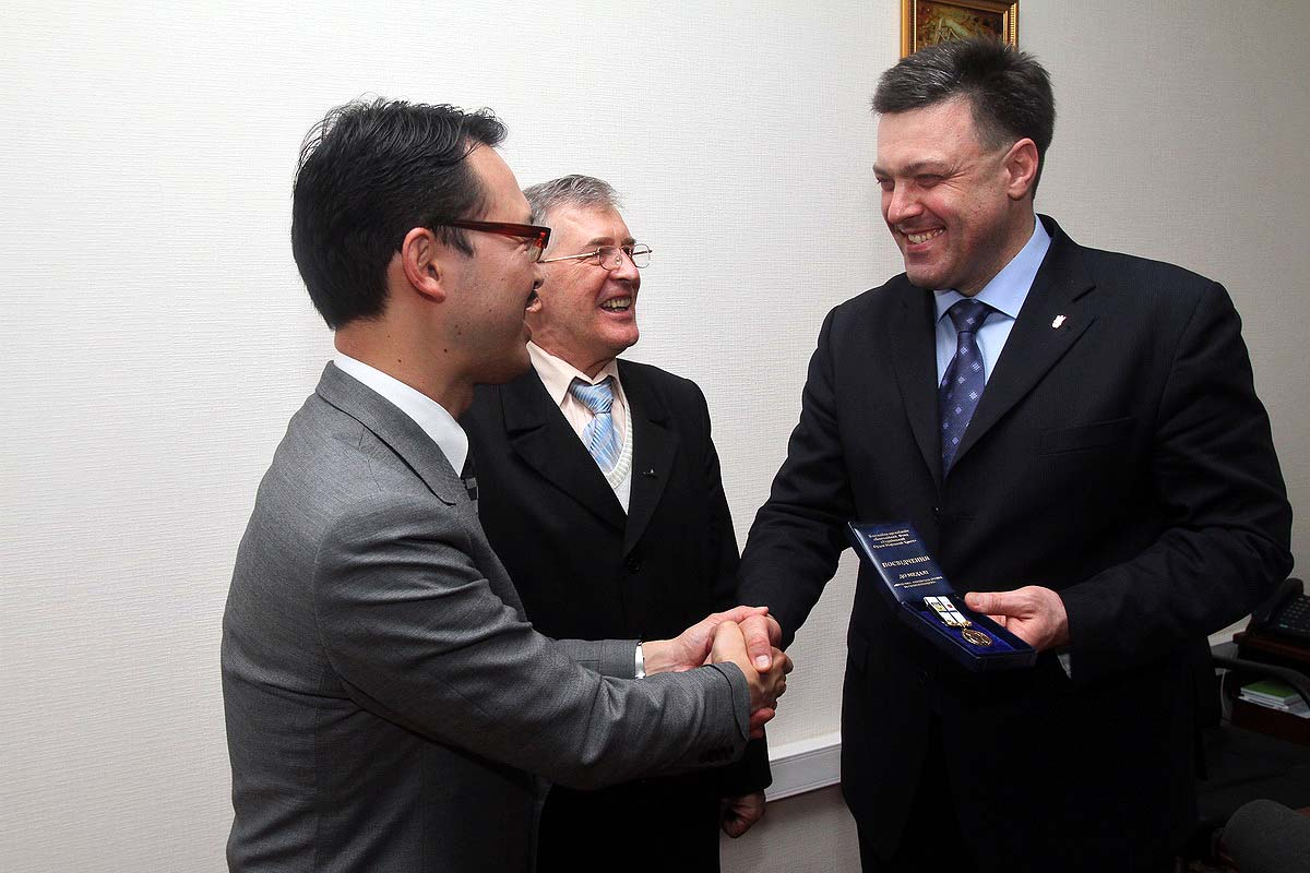 Олег Тягнибок і Йошіхіко Окабе: Йошіхіко Окабе нагороджує Олега Тягнибока нагородною відзнакою Благодійного фонду "Українсько-японська дружба і співробітництво".